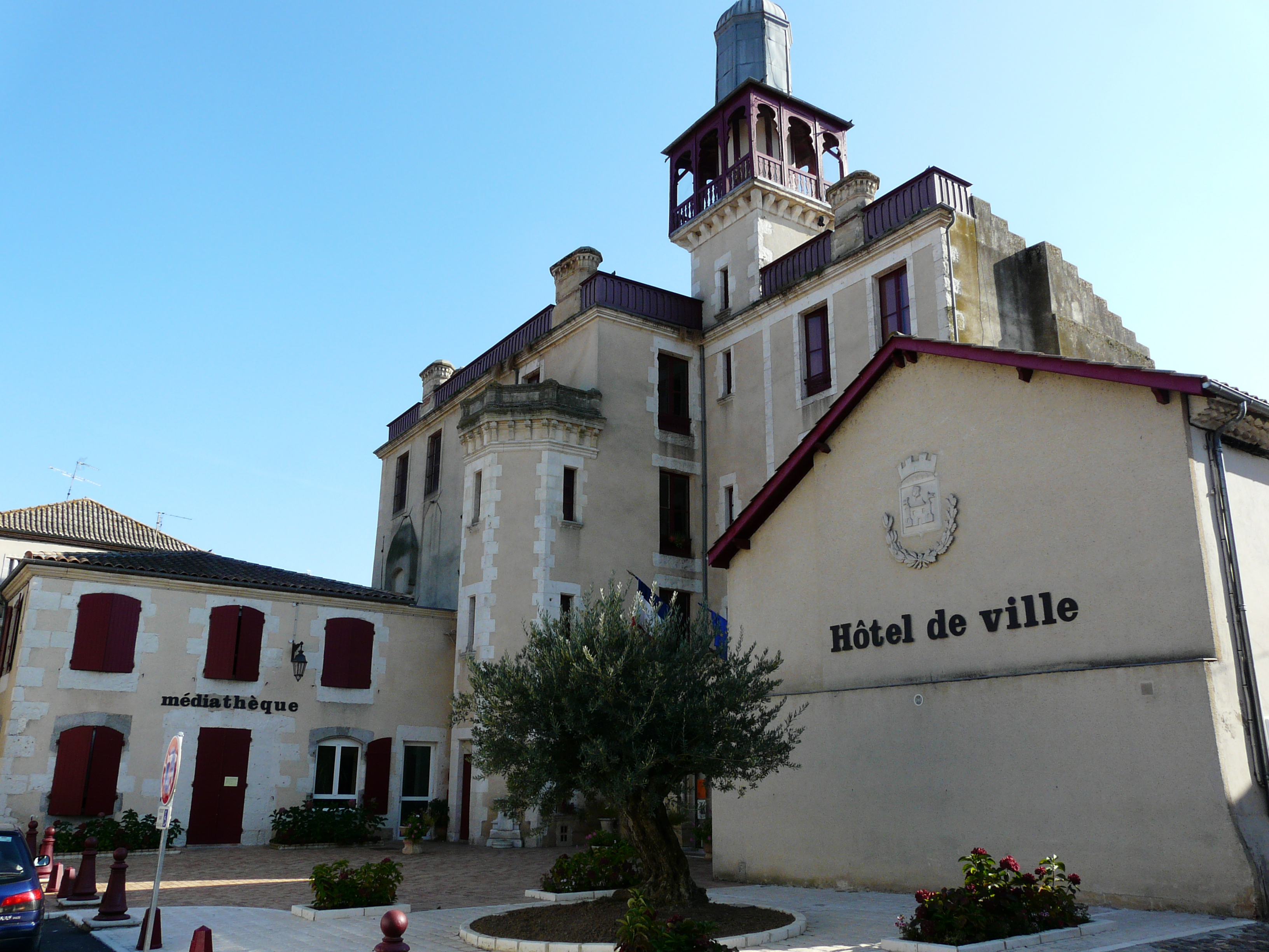 Mairie de Castelmoron-sur-Lot